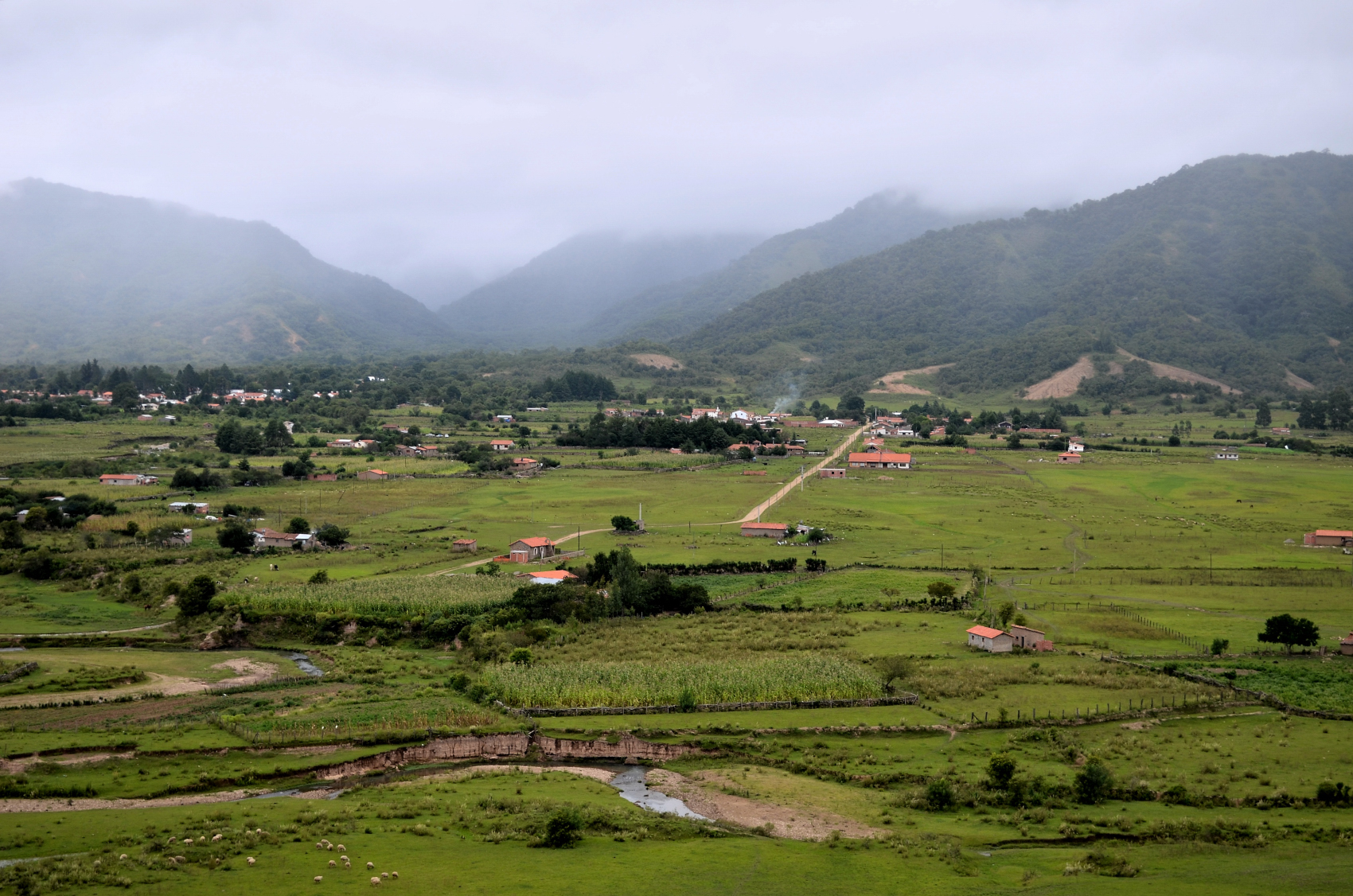 Poblado de los toldos visto desde serranias cercanas. Los Toldos es un pueblo del norte de Salta provincia de la Republica Argentina.